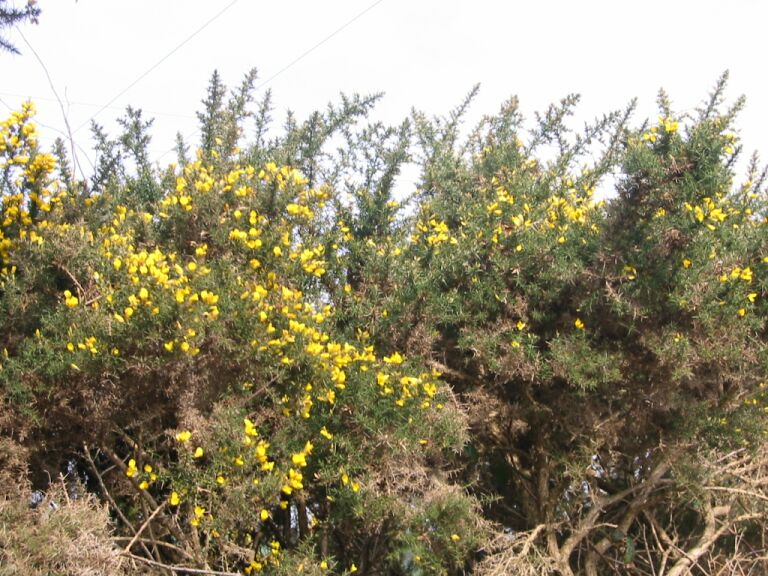 Stechginster (Ulex europaeus)